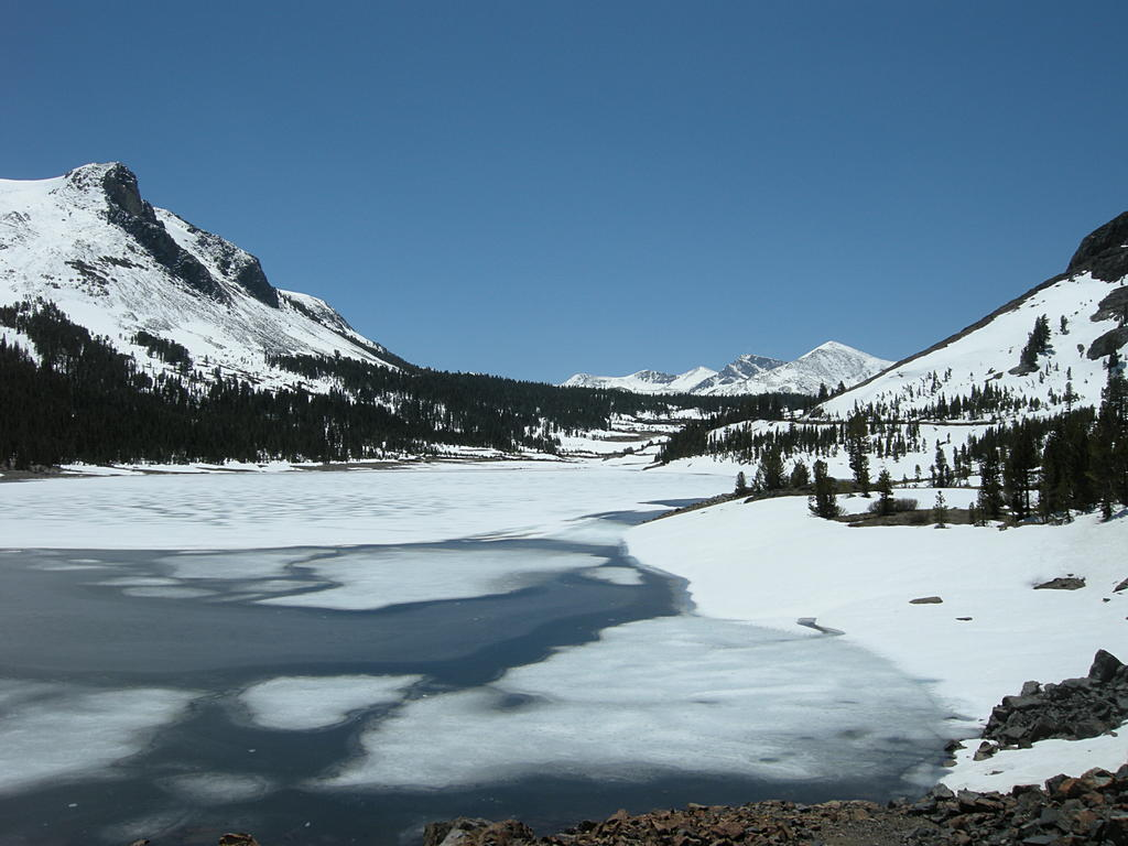 Tioga Lake in Spring